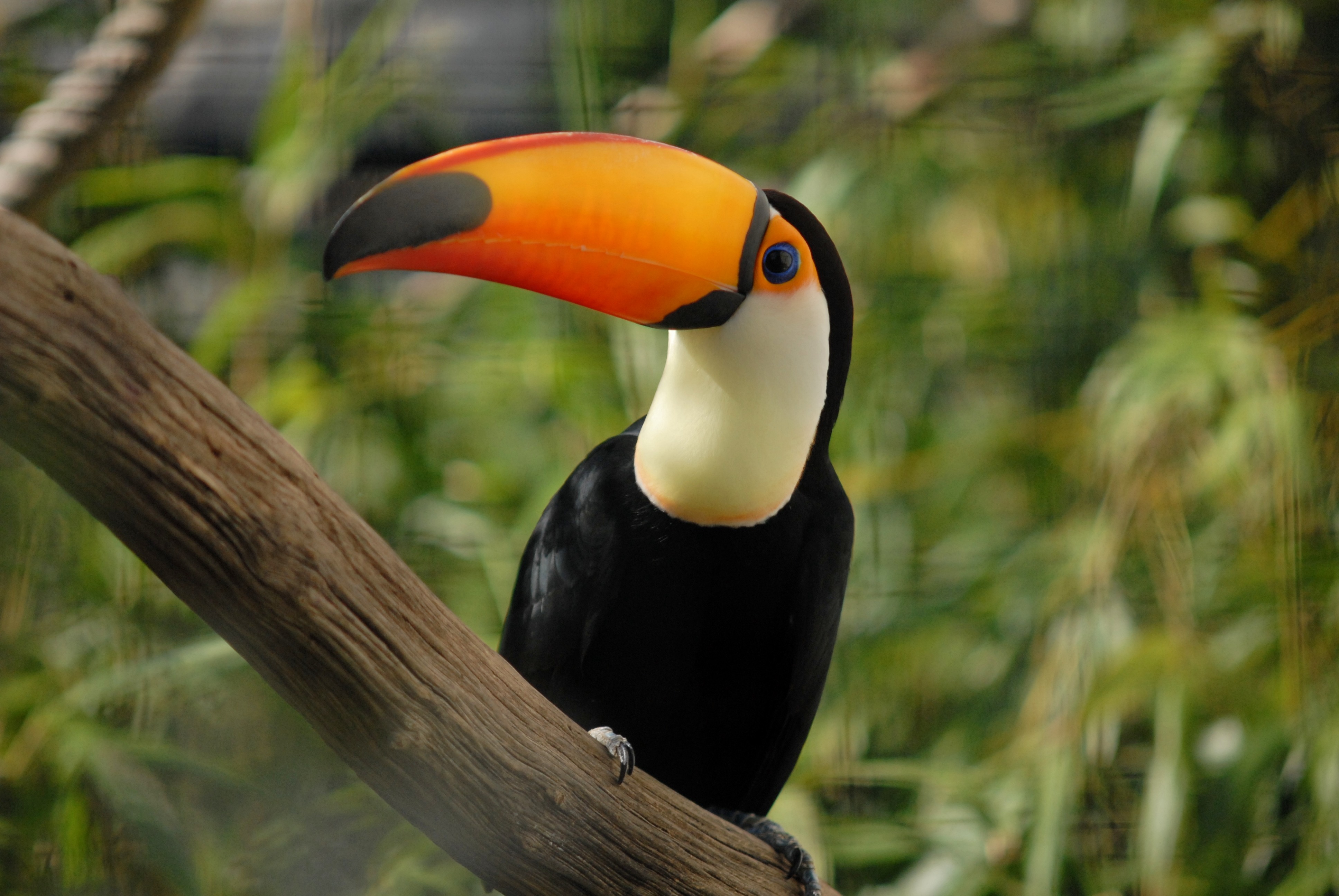 (Ramphastos toco) טוקן הטוקו